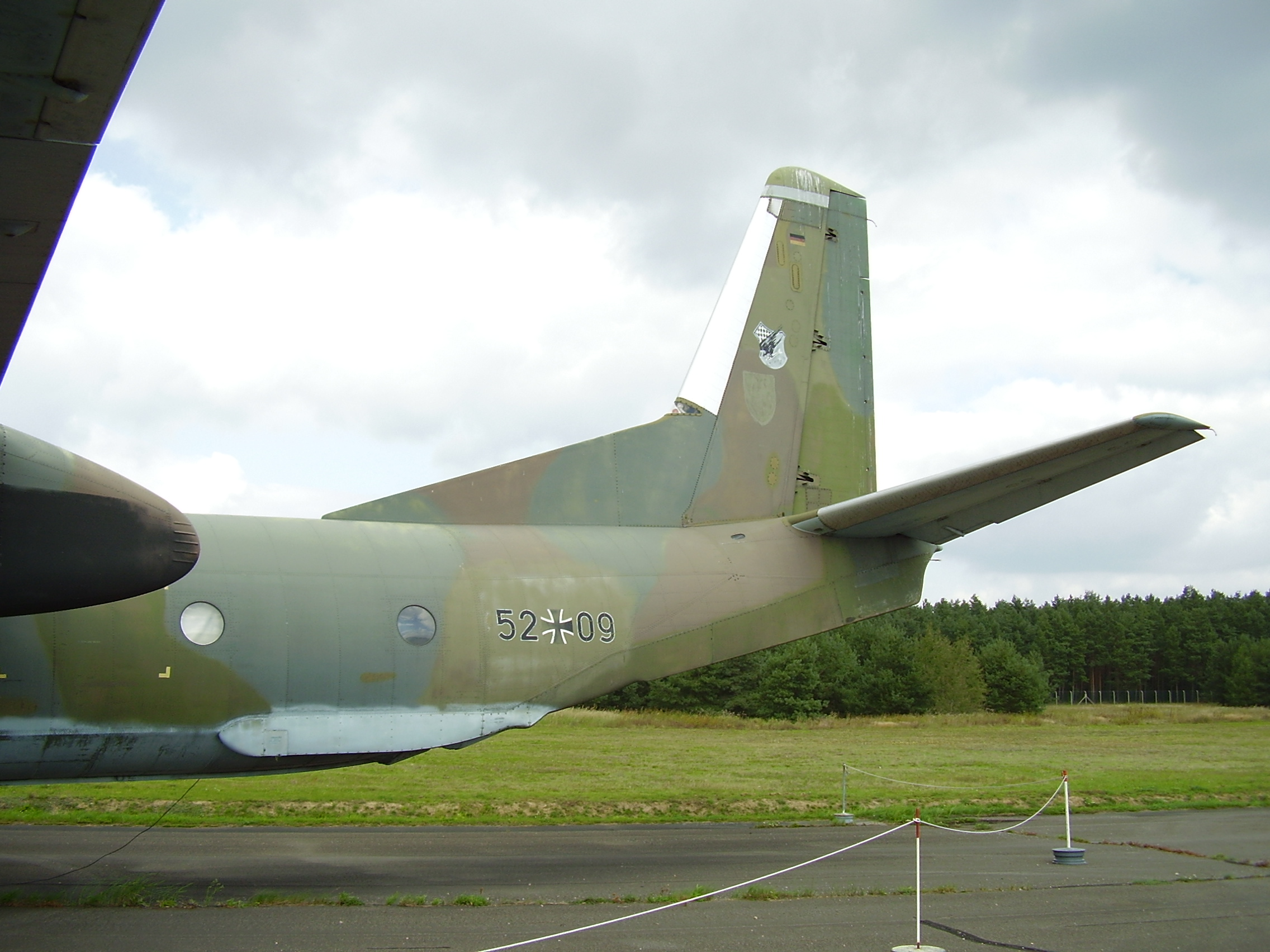 Luftwaffenmuseum der Bundeswehr; Airforce Museum of the Bundeswehr; Berlin-Gatow